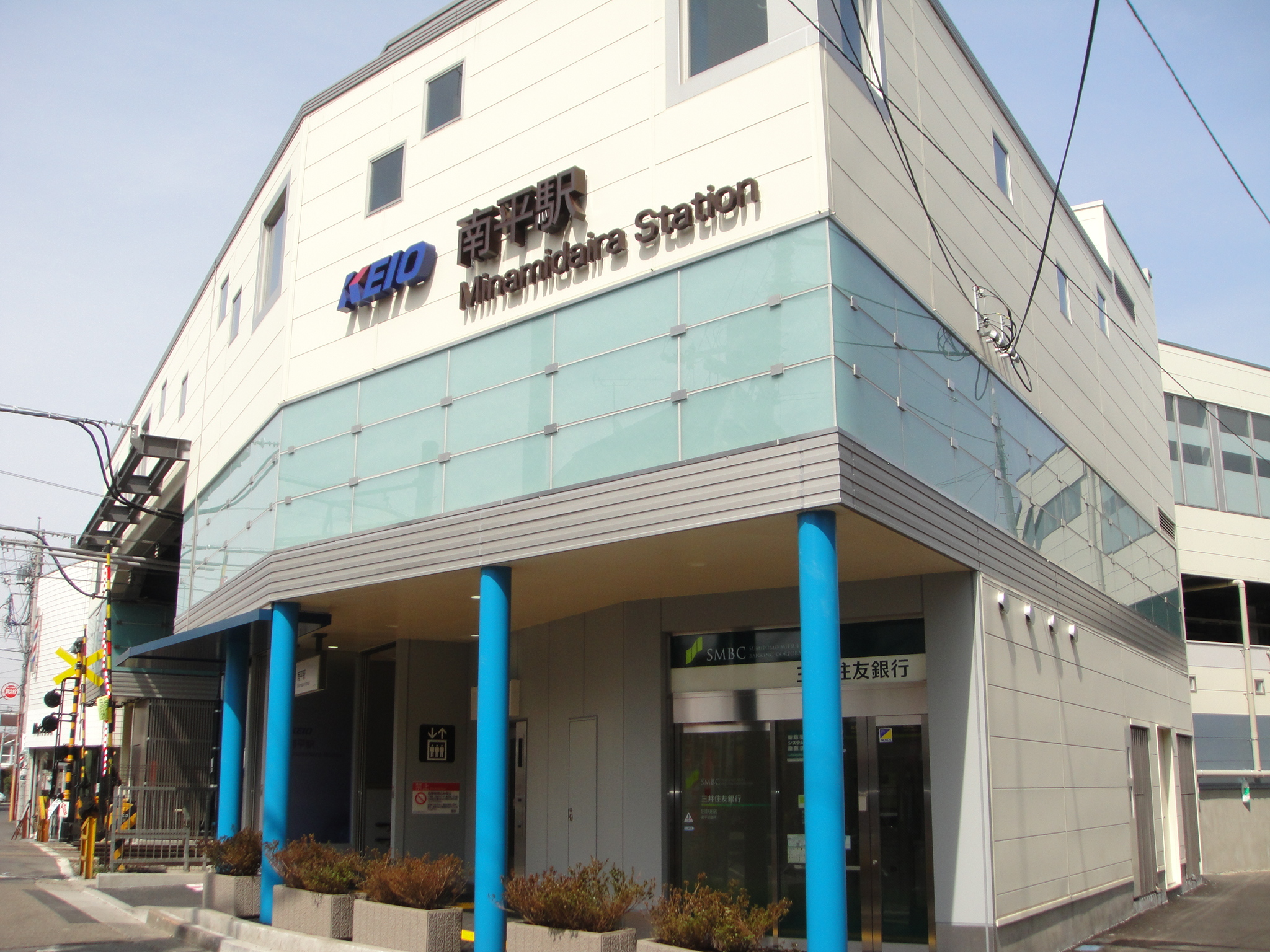 京王線 南平駅の新駅舎